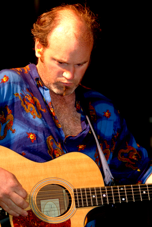 El musico Rossa Ó Snodaigh, miembro de la banda irlandesa KILA, durante el festival SonCelta, en la población de Porto Do Son, Galicia - España